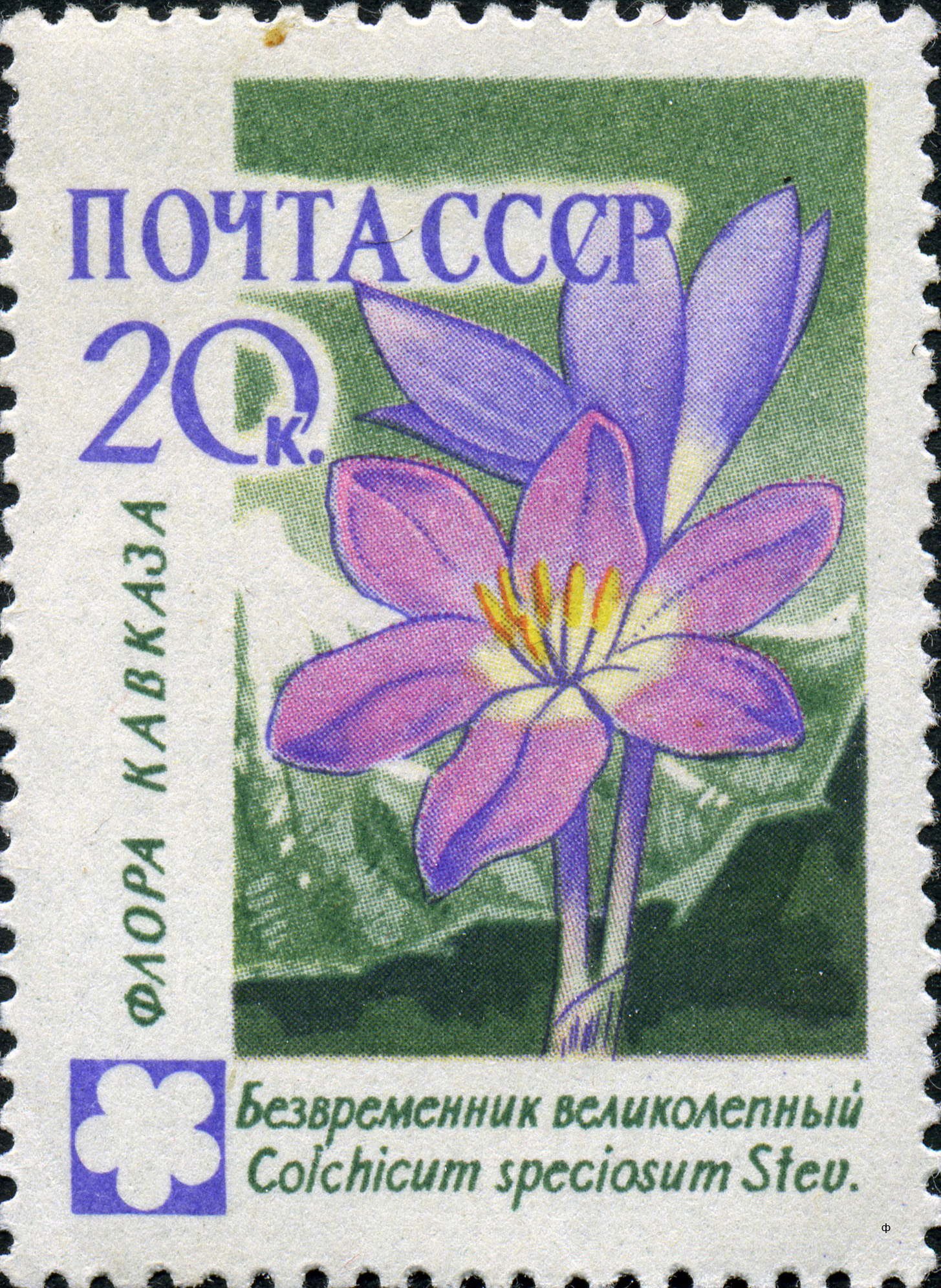 Марка СССР